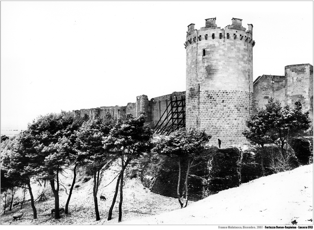 Fortezza Svevo Angioina di Lucera (FG) (anche detto Castello)